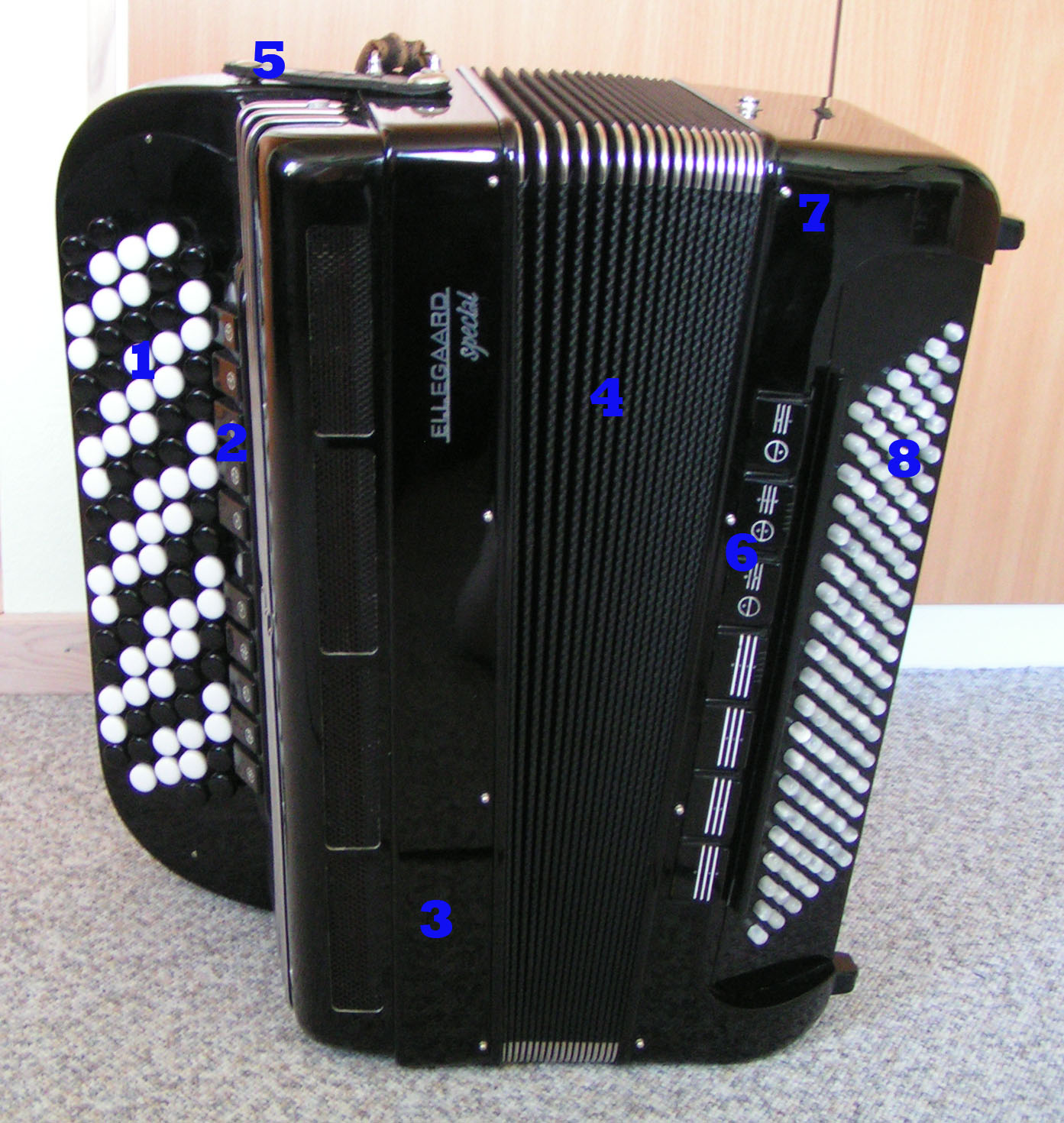 Beskrivelse af harmonikaens dele. Diskantknapper Diskantregistre Diskantsokkel Bælg Bælglås Basregistre Bassokkel Basknapper